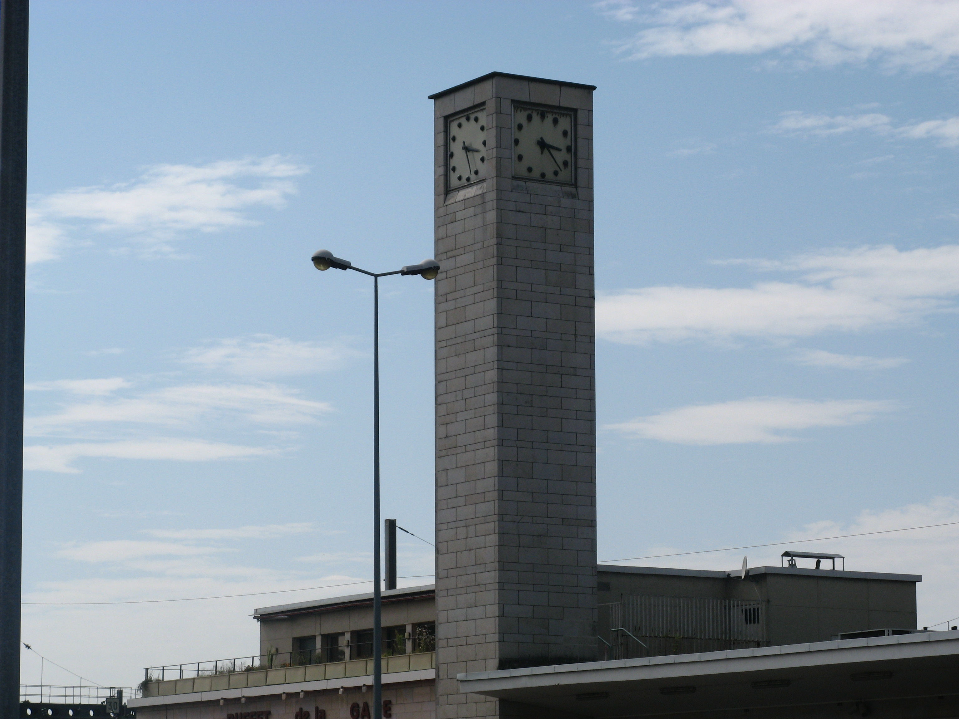 gare viotte besancon